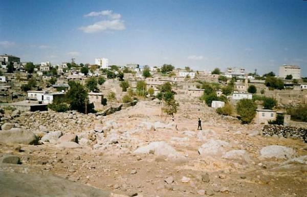 Beth Zabday